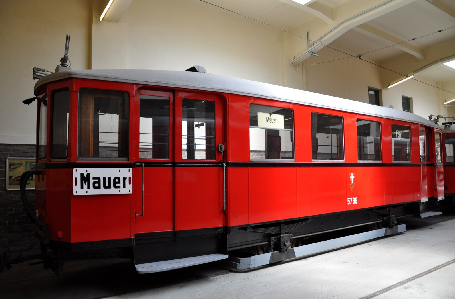 Tram Museum (46)